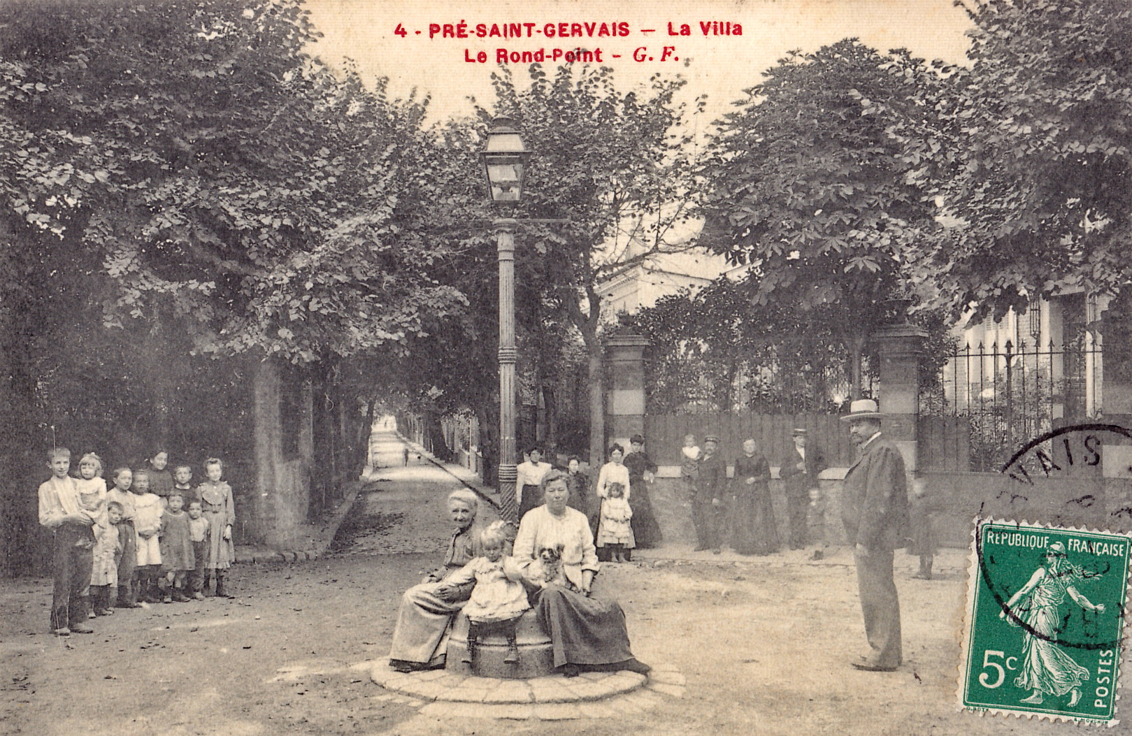 Carte postale ancienne éditée par GF, n°4 :PRE-SAINT-GERVAIS - La Villa - Le Rond-Point